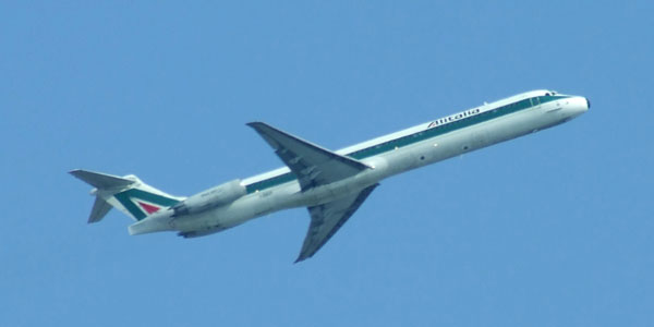 Aereo dell'Alitalia